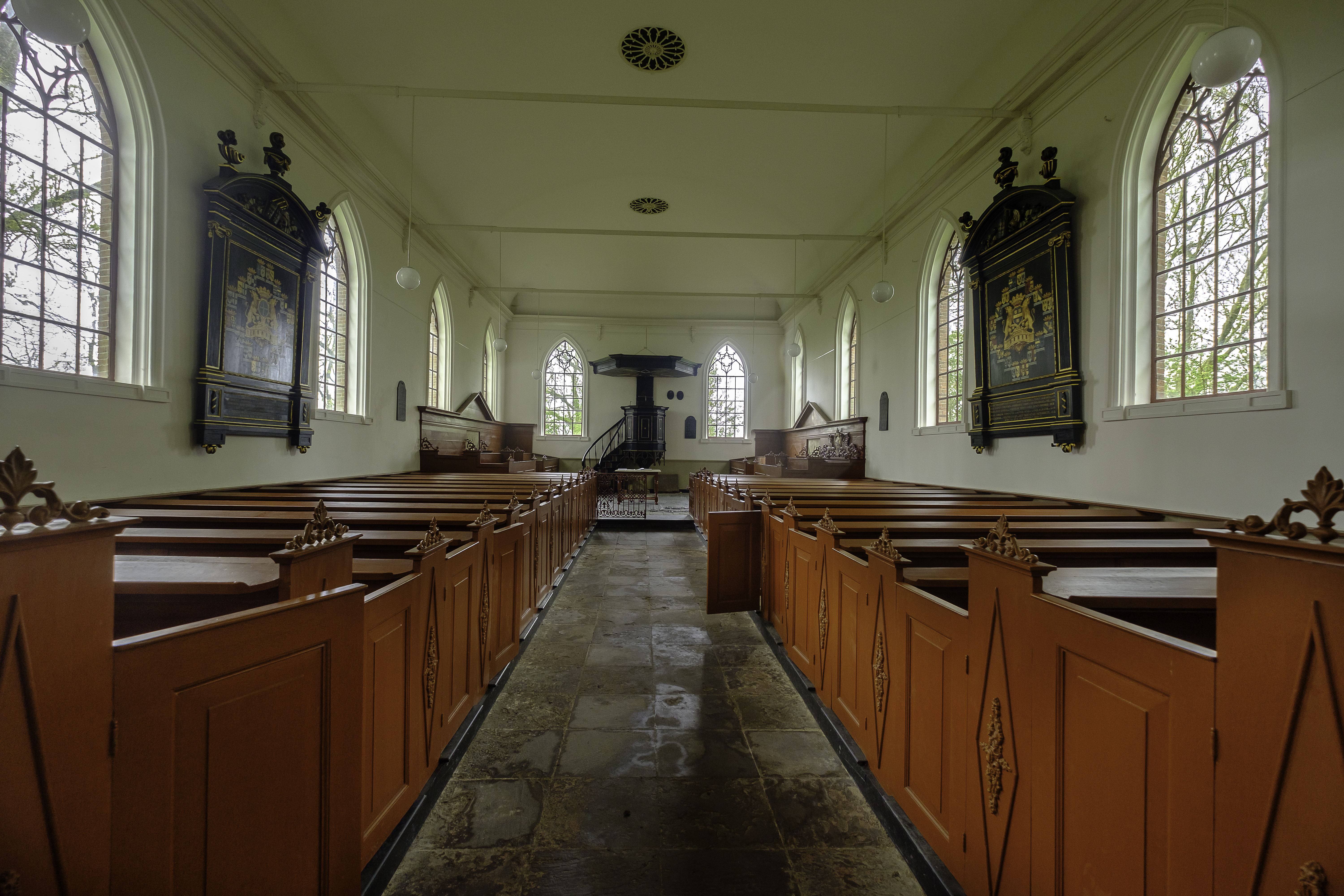 Interieur van de kerk van Wittewierum